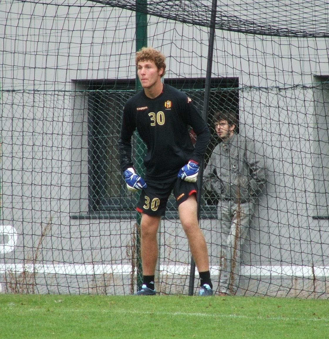 Le troisième gardien du MUC 72, l'international Géorgien Georgi Makaridze lors d'un entrainement au Mans, le 27 Août 2009.